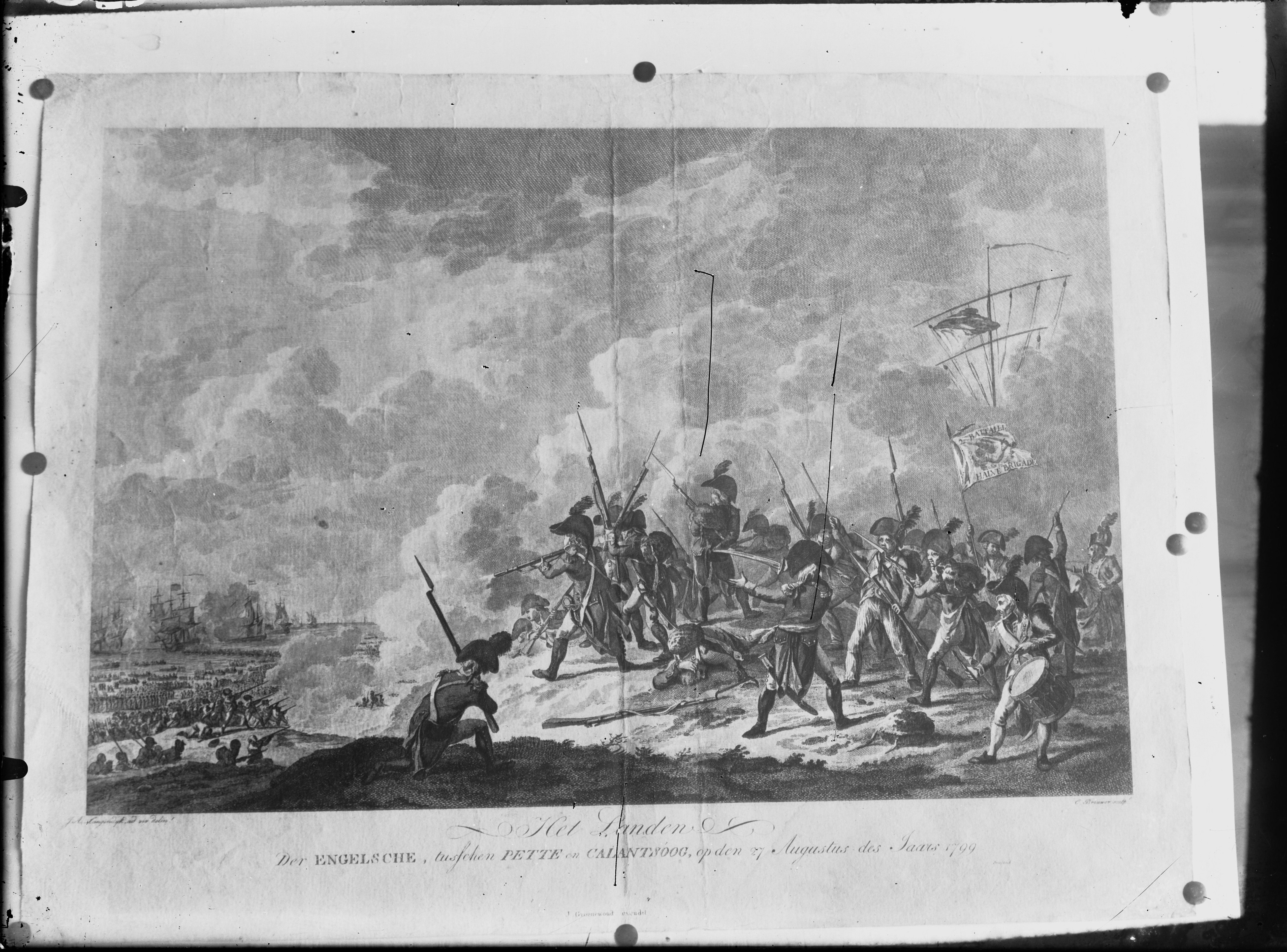 Fotografische reproductie van een prent met het onderschrift: Het landen der Engelsche, tusschen Pette en Calantsoog, op den 27 Augustus des Jaars 1799.